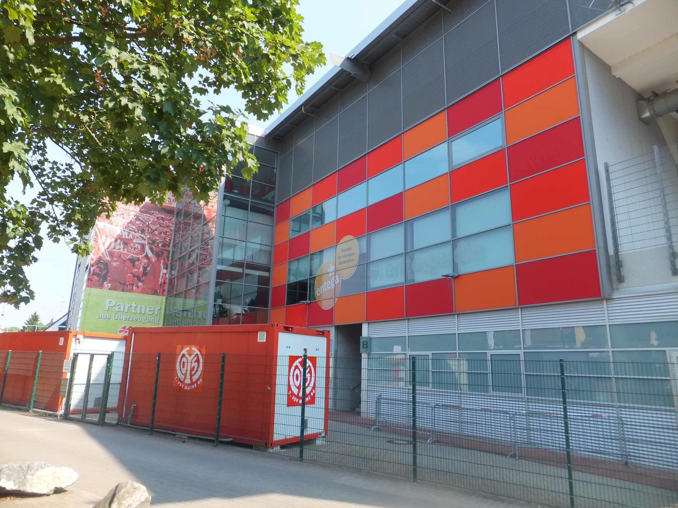 Geschäftsstelle des Nachwuchsleistungszentrums des 1. FSV Mainz 05.